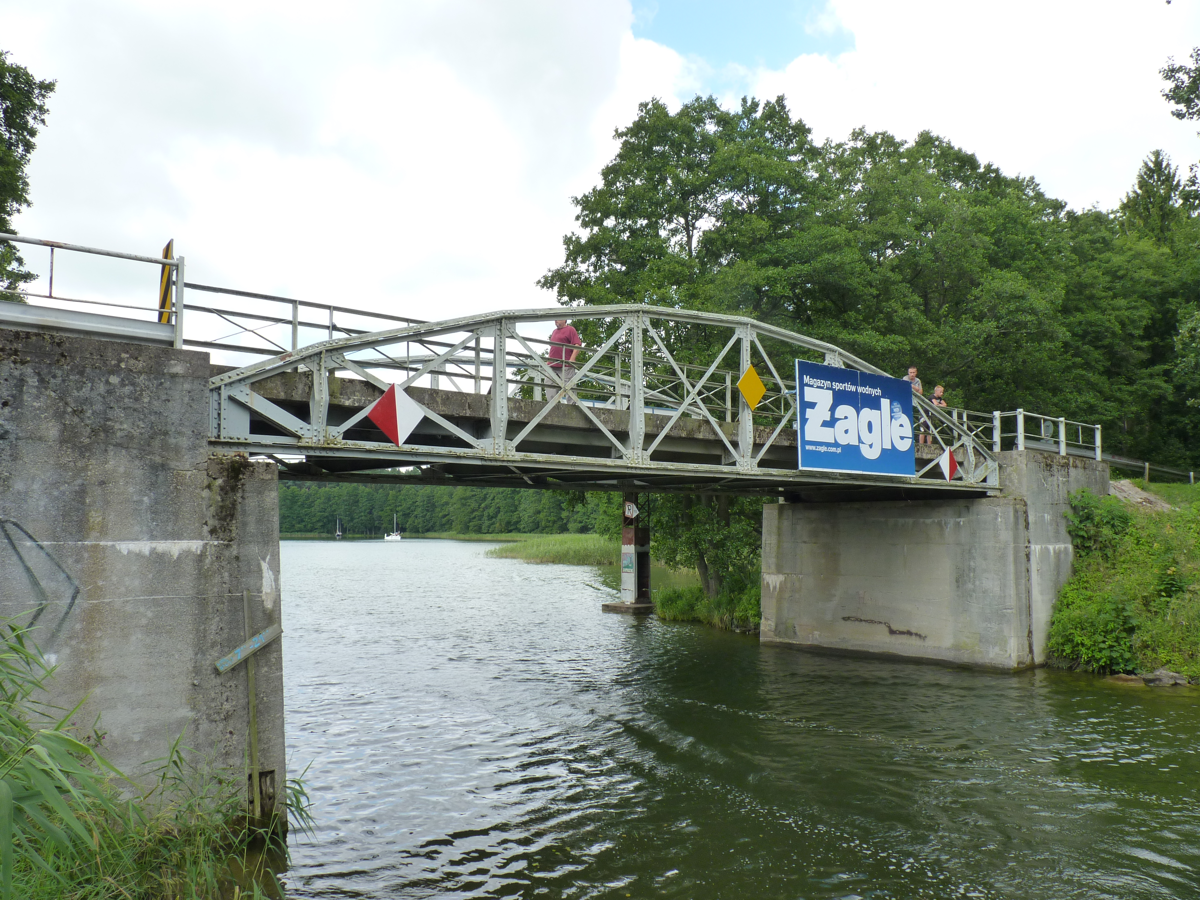 Kanał Kula. Most drogowy